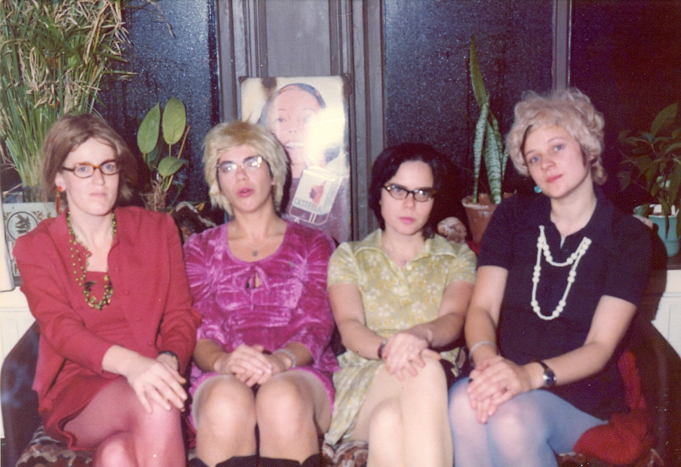 Foto auteurs Wilde Rozen